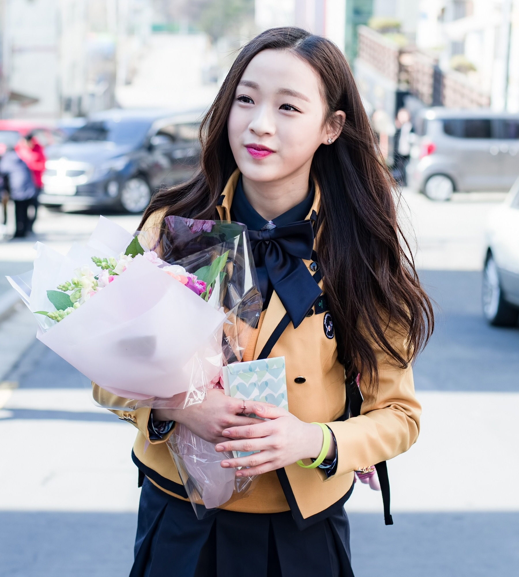 170302 서공예 입학식 진솔 3Pic